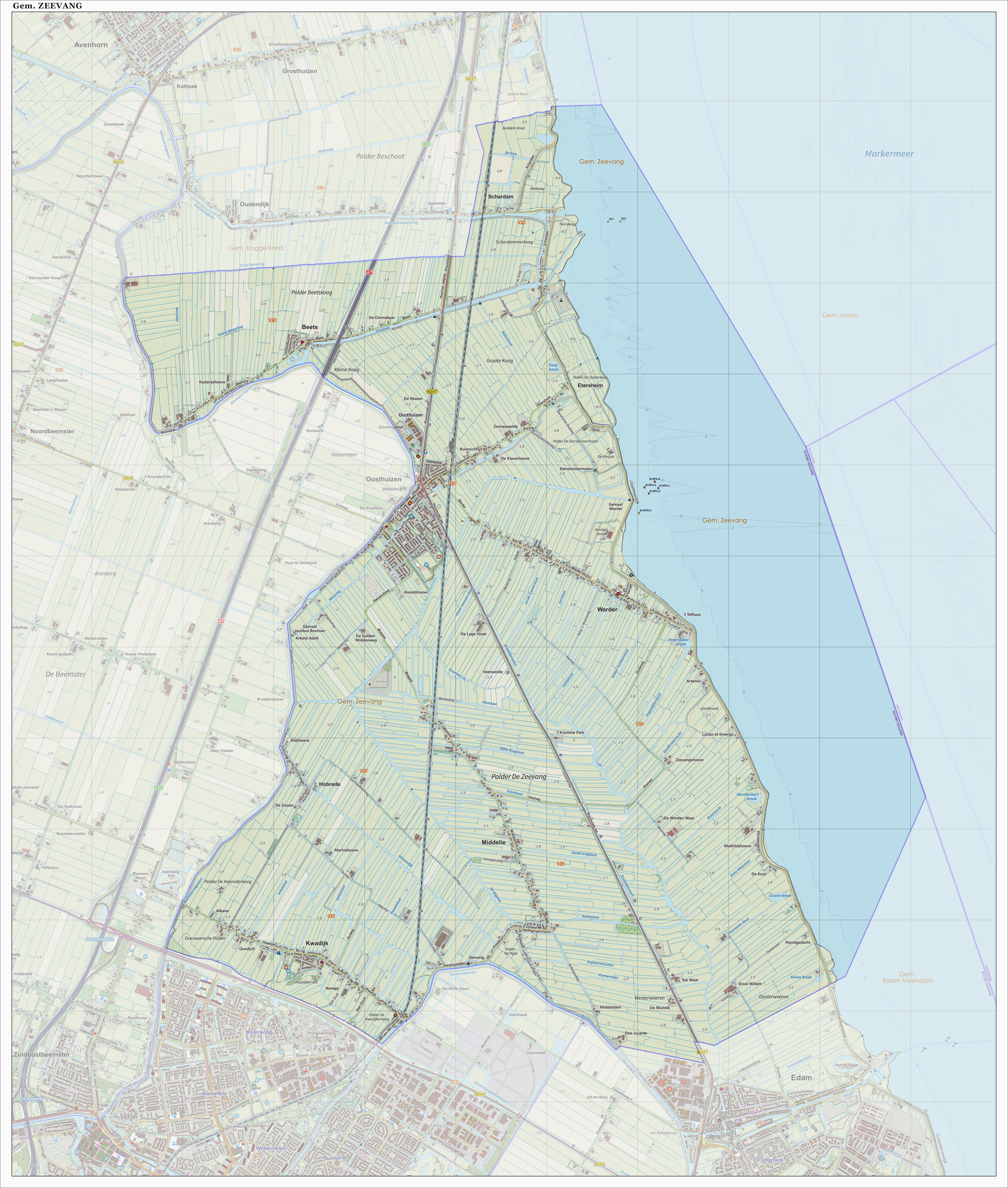 Topografische gemeentekaart. Resolutie: 300 pixels/km. Kaartbeeld samengesteld uit de open geodata van de Top10NL en Top25namen (Kadaster), Creative Commons-BY licentie. Gebouwvlakken uit open geodata BAG extract. Wegen uit de OpenStreetMap, OpenStreetMap community. Reliëfschaduw uit de Actuele Hoogtekaart AHN2. Samenstelling en kleurenschema: Jan-Willem van Aalst, met QGIS. Zie ook de Legenda.